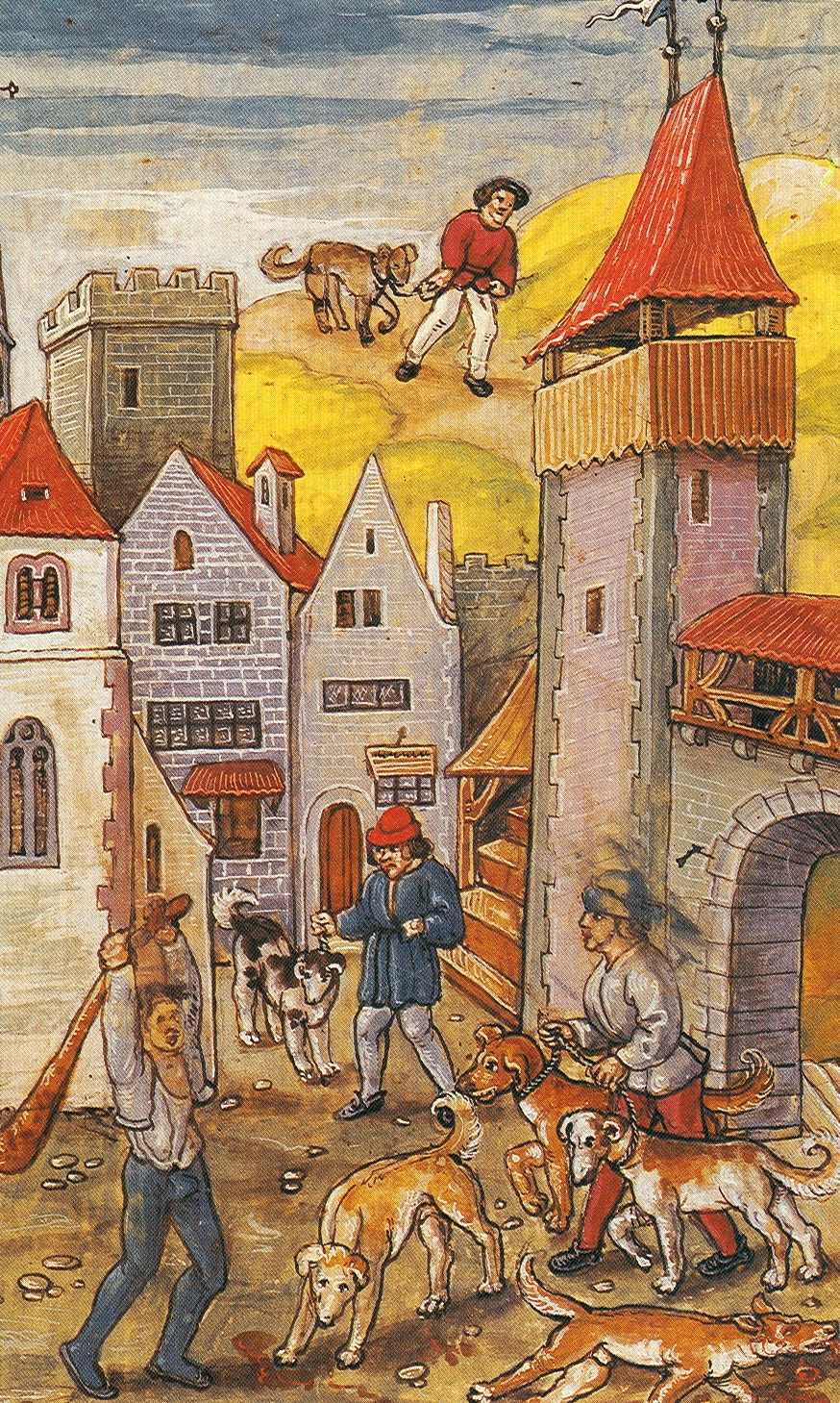 Hans Waldmann lässt die Hunde der Bauern erschlagen. Aus der Chronik von Diebold Schilling dem Jüngeren